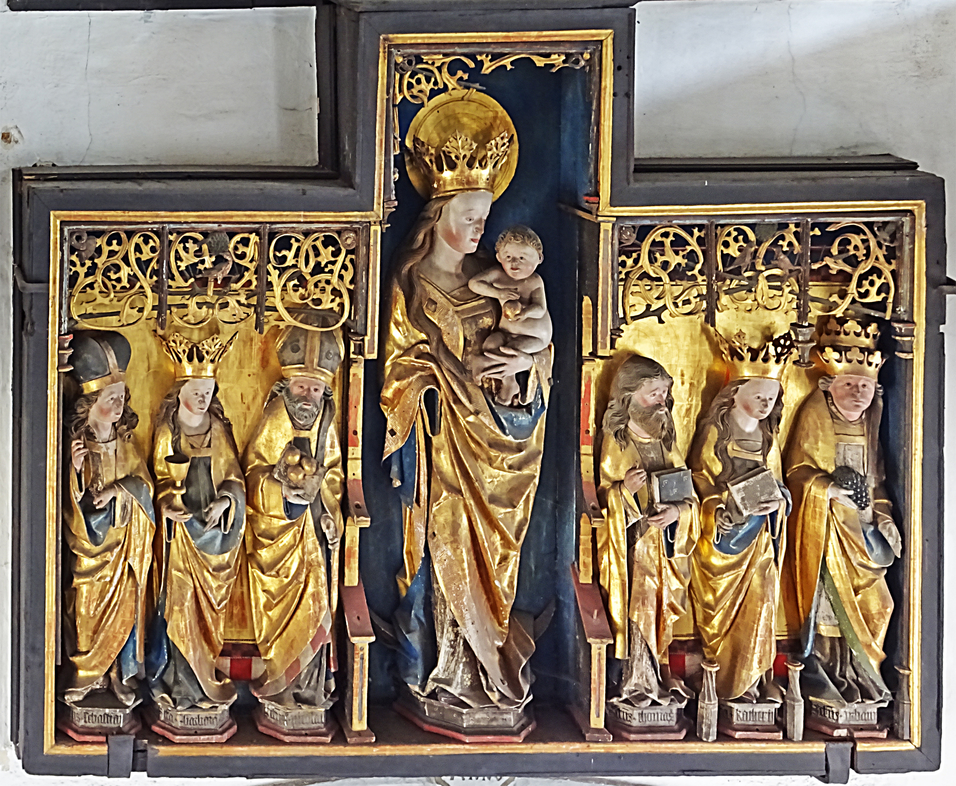 Mittelteil eines vierflügeligen Schnitzaltars von 1504 aus Saalfelder Schule in der Dorfkirche Ammerbach vom Meister des Meckfelder Altars. Er zeigt im höheren Mittelschrein Maria mit dem Christusknaben, links davon, von außen: St Sebastian (Buch), St. Barbara (Kelch), St. Nikolaus(drei goldene Kugeln); rechts, von innen: St. Thomas (Buch), St. Katharina (Buch), St. Urban (Weintraube).